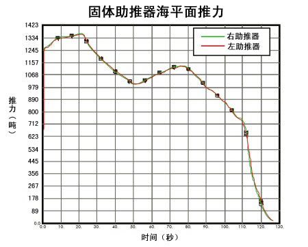 SRB推力